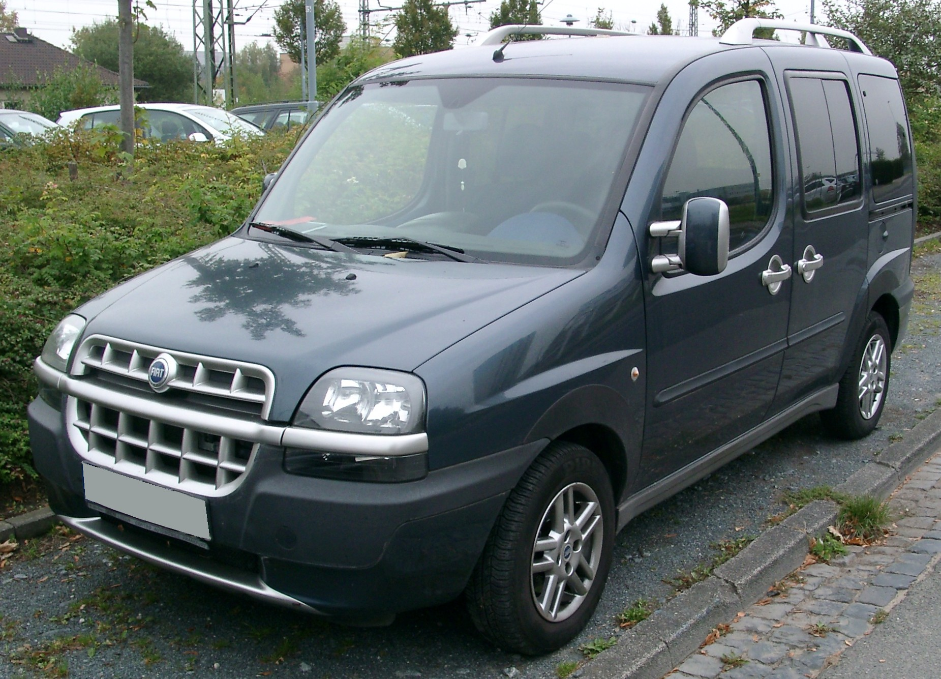 Fiat Doblo